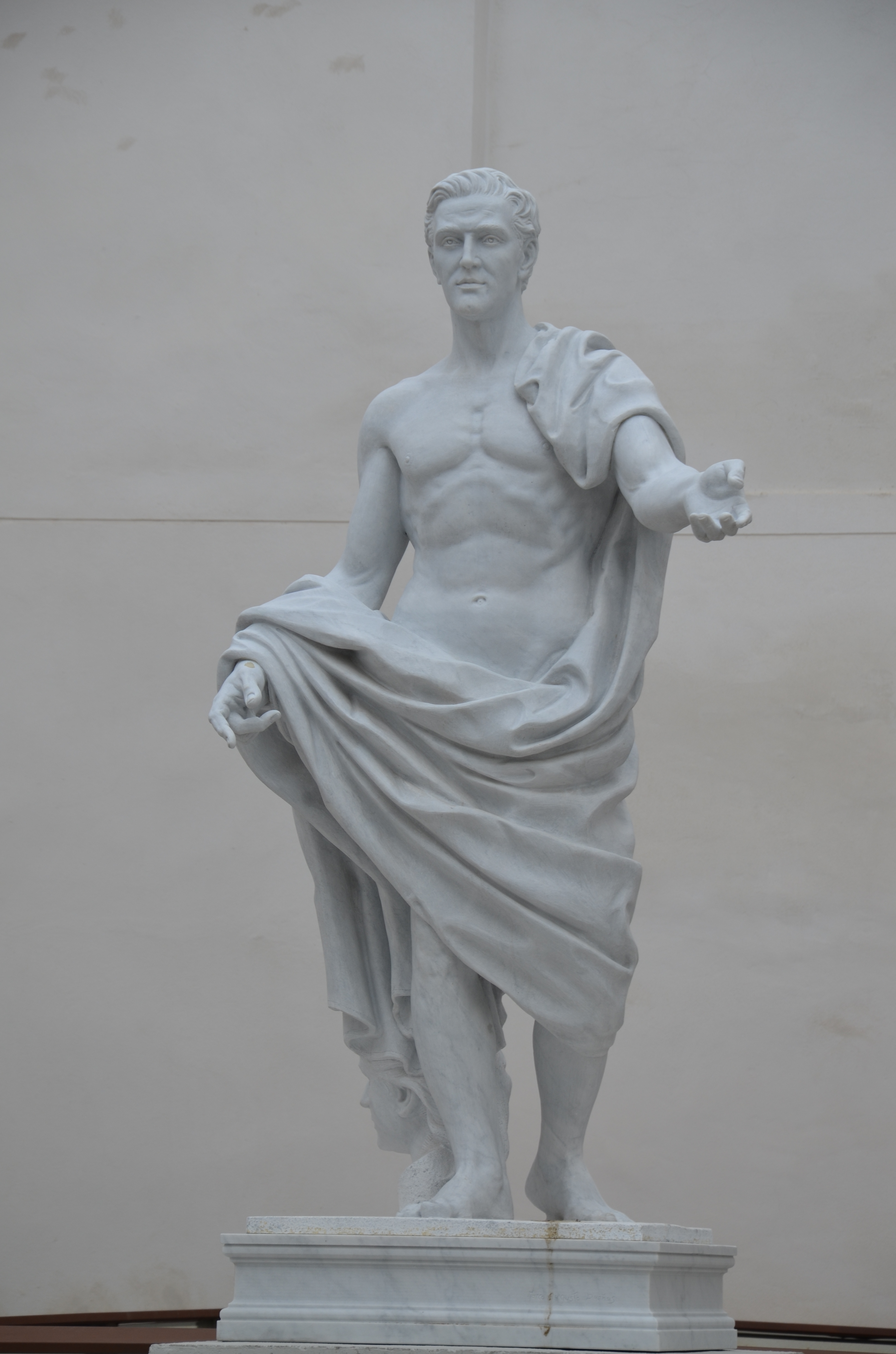 Estatua a Claudio Marcelo en Córdoba (España).